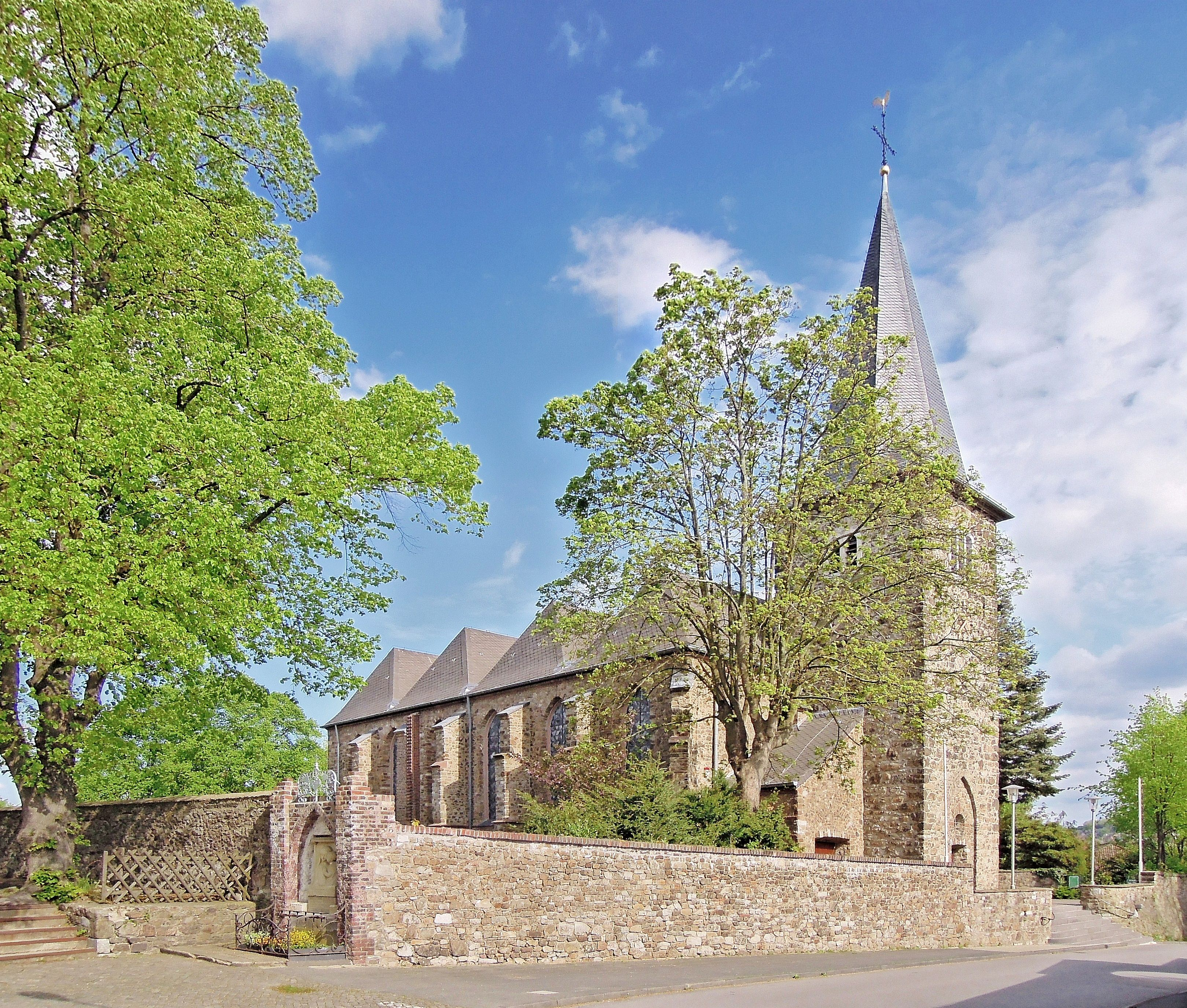 Katholische Kirche Weisweilers